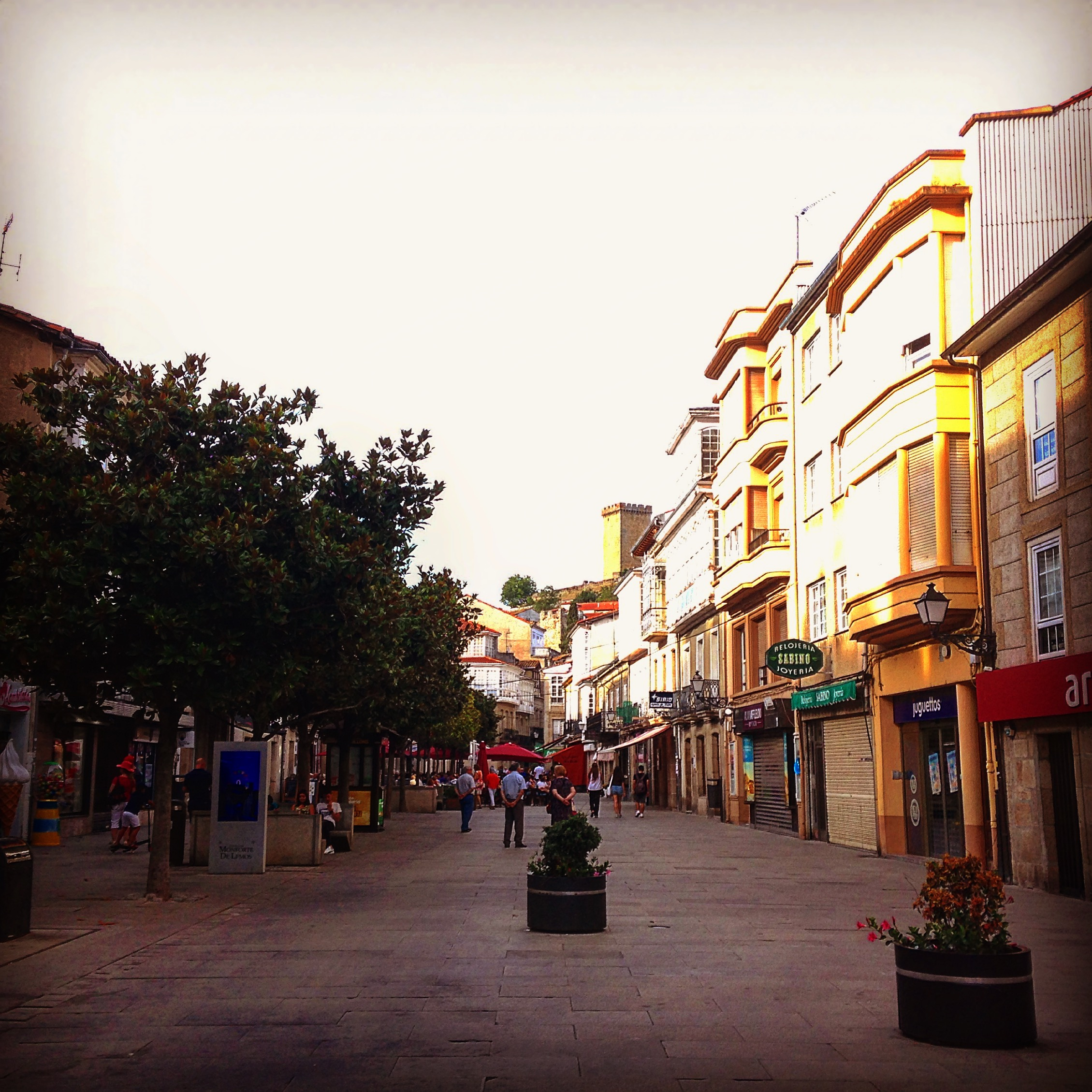 Rúa Cardenal en Monforte de Lemos.